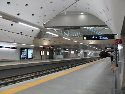 Estação do Metropolitano de Lisboa (Portugal).